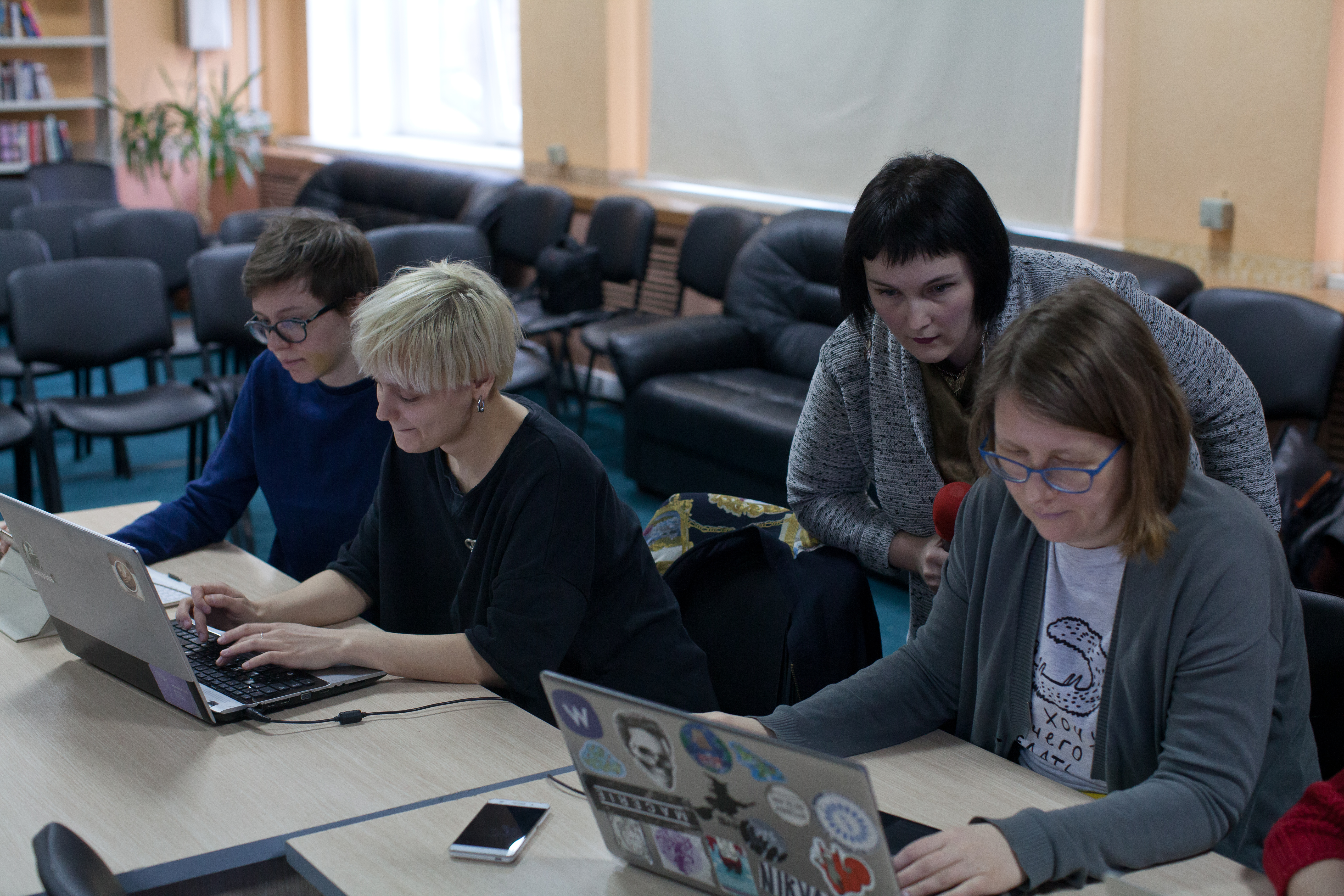 Мастер-класс по основам Википедии в Центральной универсальной научной библиотеке имени Н. А. Некрасова (Москва). Совместный проект с Фем-клубом. Ведущая - София Багдасарова (Shakko)